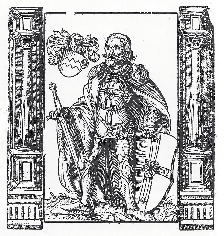 Holzschnitt von Werner von Orseln